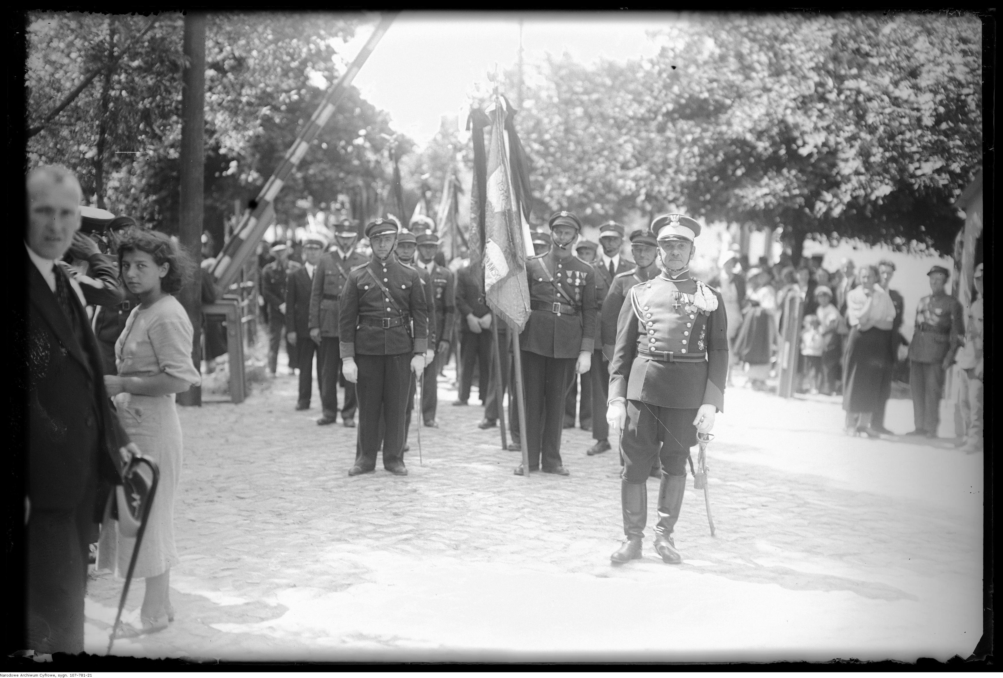 Pogrzeb gen. Gustawa Orlicz-Dreszera. Poczty sztandarowe - na czele poczet sztandarowy Związku Peowiaków.